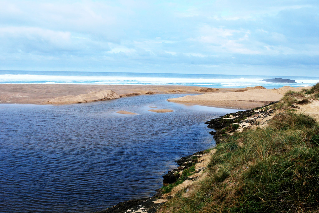 Canle artificial da lagoa de Valdoviño, A Frouxeira A Coruña Galiza Spain